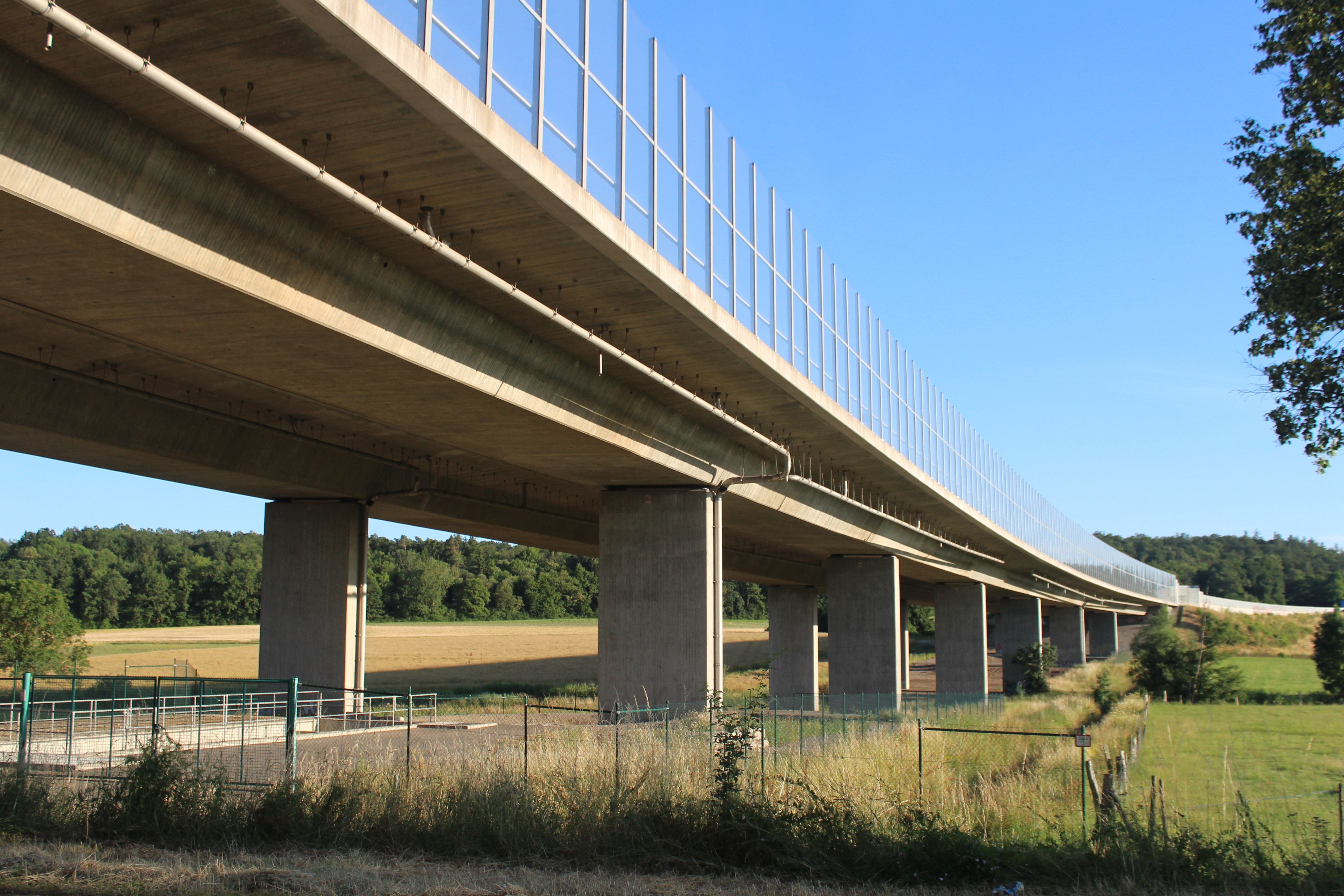 Würmtalbrücke der Autobahn A81 bei Ehningen